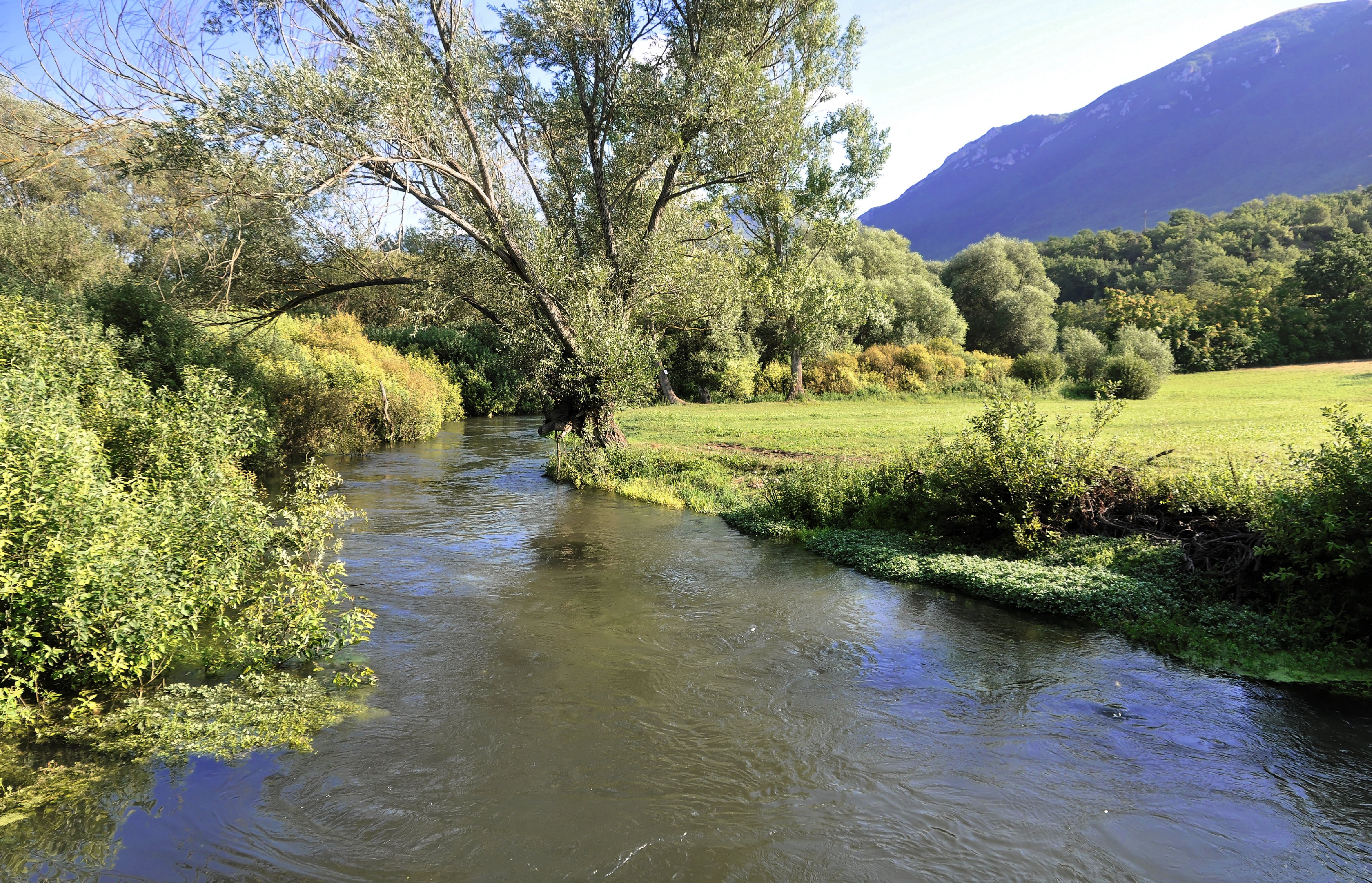 Fiume Tirino 2013